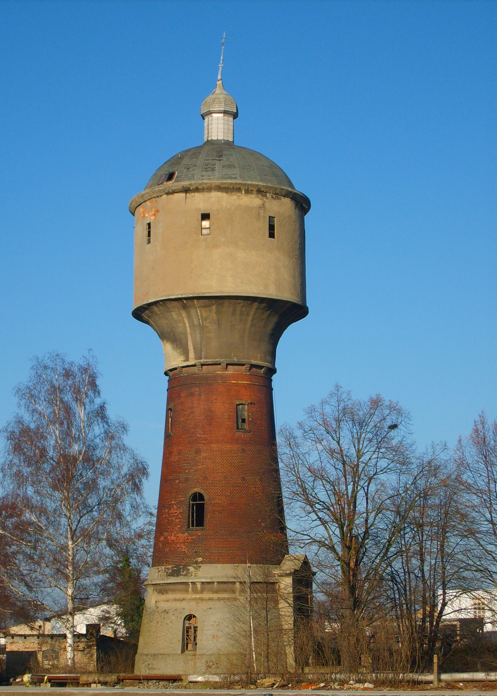 Der Wasserturm in Elsterwerdaer Weststraße